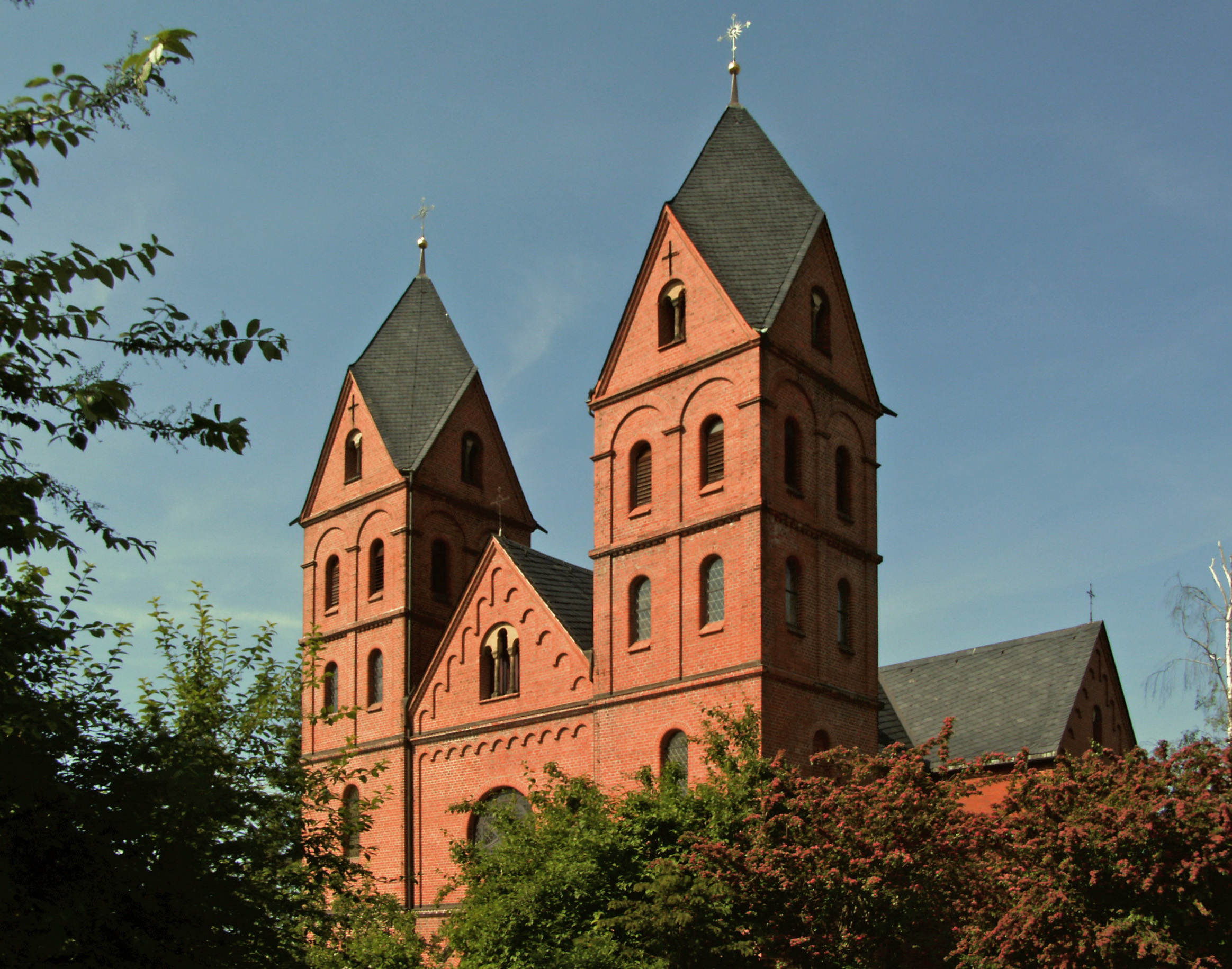 Katholische Kirche St. Marien von der Unbefleckten Empfängnis in Wernigerode, Landkreis Harz